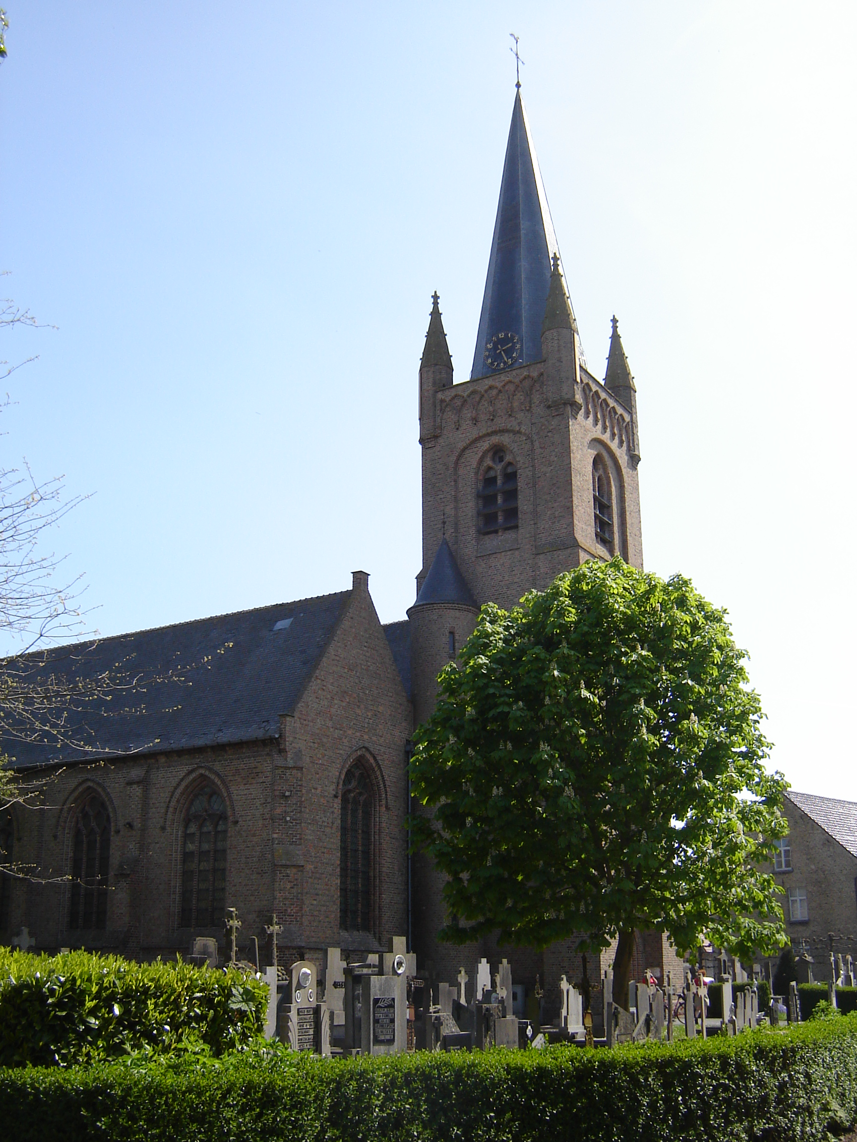 Sint-Niklaaskerk in Keiem Church of Saint Nicolas, Keiem, Diksmuide, West Flanders, Belgium